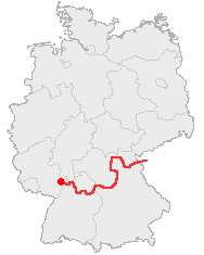 Course Map of Deutsche Burgenstraße